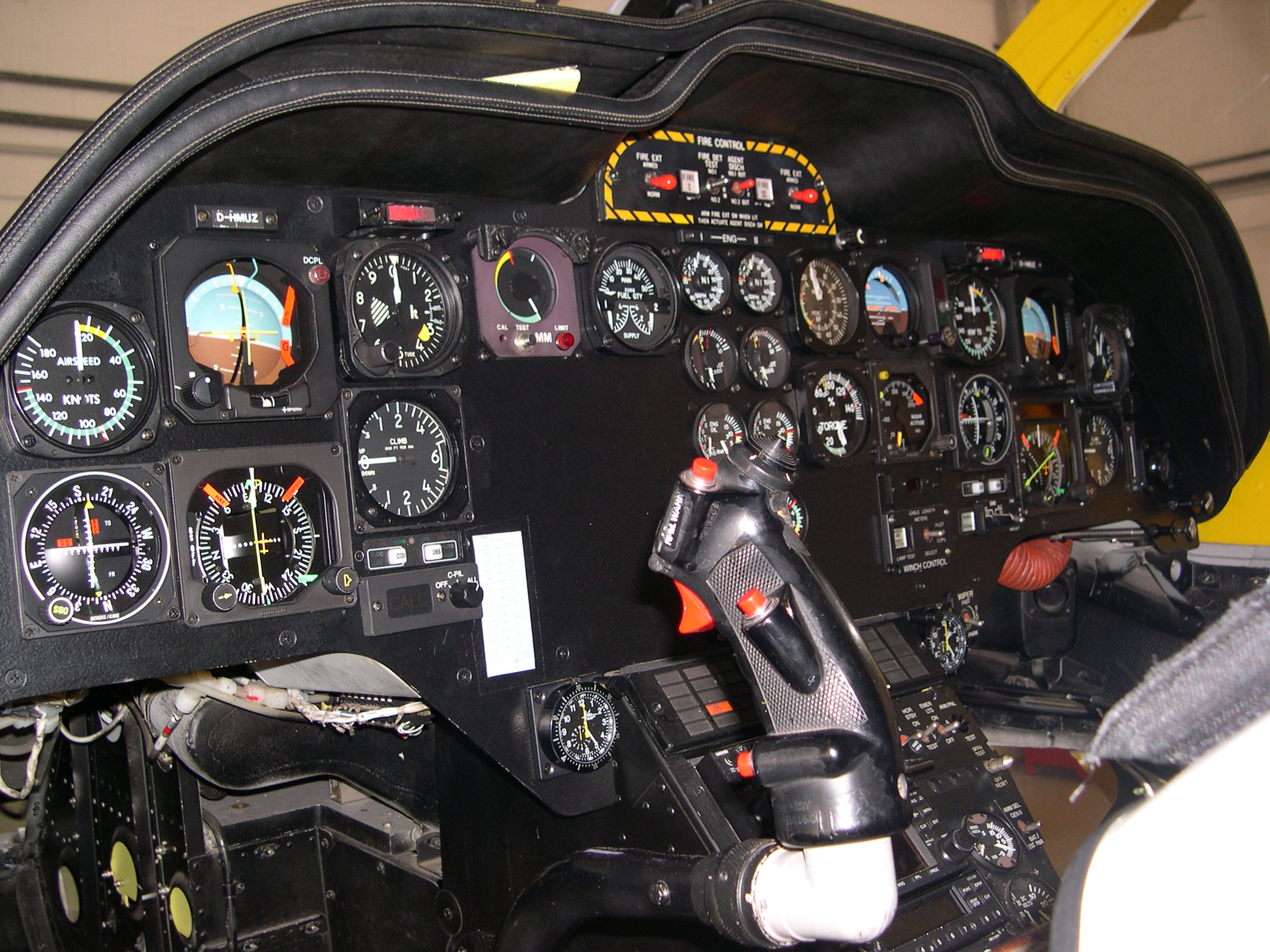 Innenansicht in das Cockpit des Christoph 26